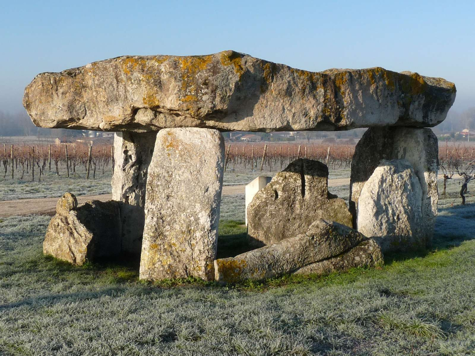 dolmen de St-Fort-sur-le-Né, Charente, France